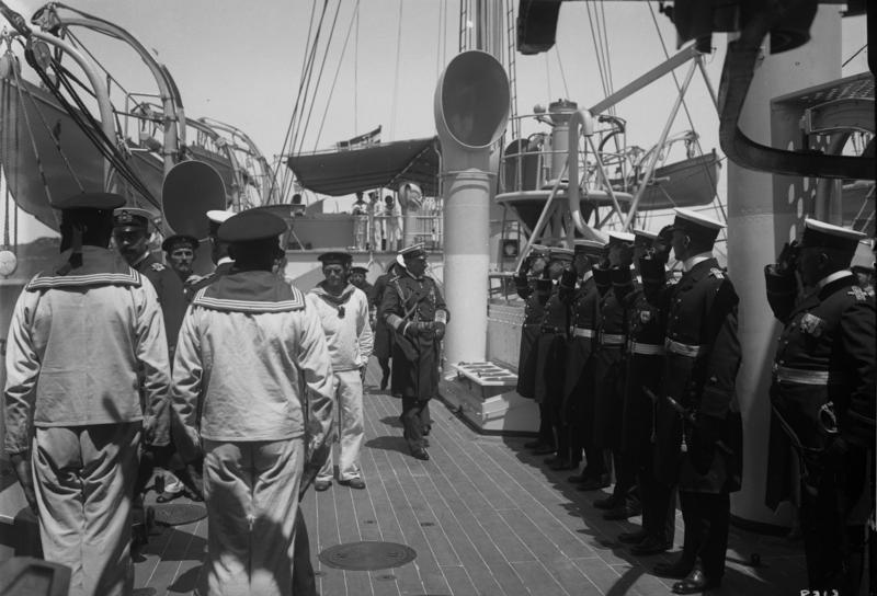 Besuch auf der SMS "Geier" SMS "Geier" der kaiserlichen deutschen Marine [Kleiner geschützter Kreuzer "Geier", Stapellauf 18.101894 auf der Kaiserlichen Werft in Wilhelmshaven, bestimmt zum Einsatz in den Überseegebieten, 1914 auf Hawaii internet, nach Kriegseintritt der USA konfiziert, in USS "Schurz" umbenannt, 1918 nach K] Abgebildete Personen: Wilhelm II.: Deutsches Reich, Kaiser, II., Deutschland